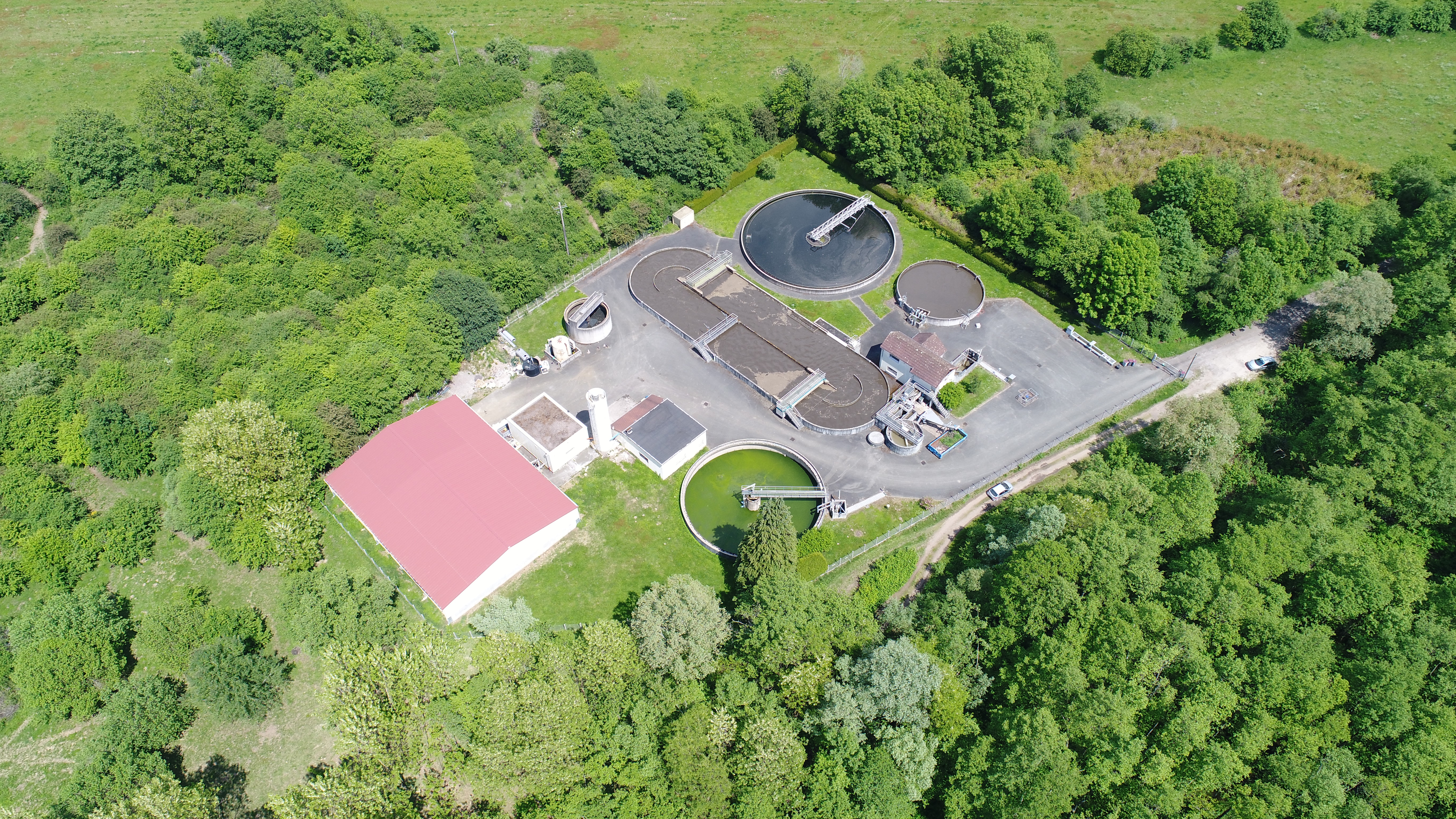 Vue aérienne de la station d'épuration de Ronchamp.